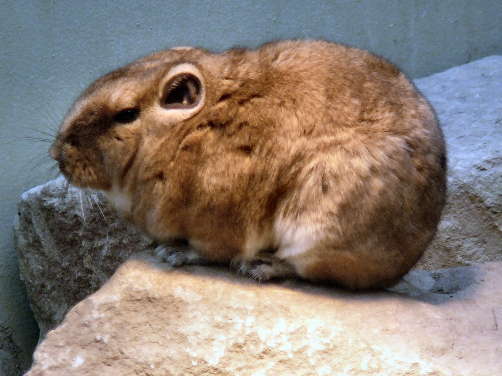 Ctenodactylus gundi (Gundi). Ctenodactylidae. Wilhelma zoo - Stuttgart - Germany